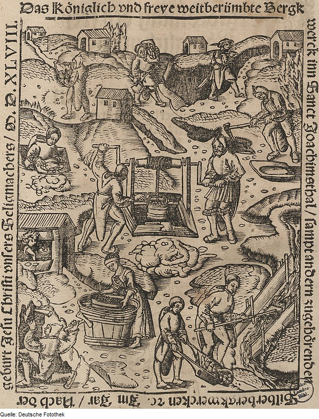 Original image description from the Deutsche FotothekBergbau & Bergwerk & Silberbergbau